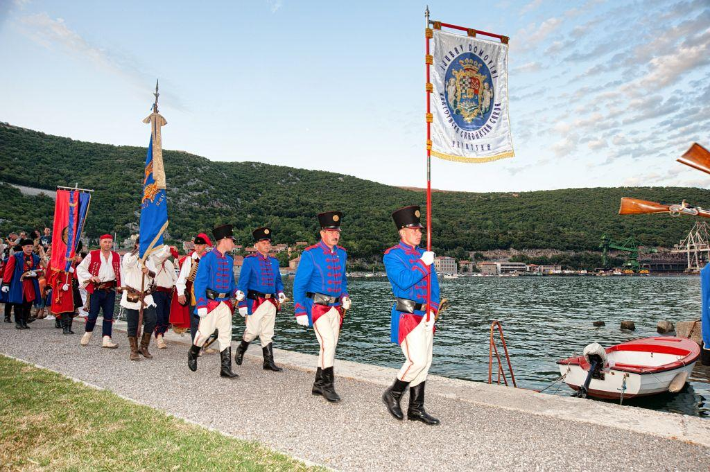 Karlovačka građanska garda, mimohod povijesnih postrojbi HV u Bakru